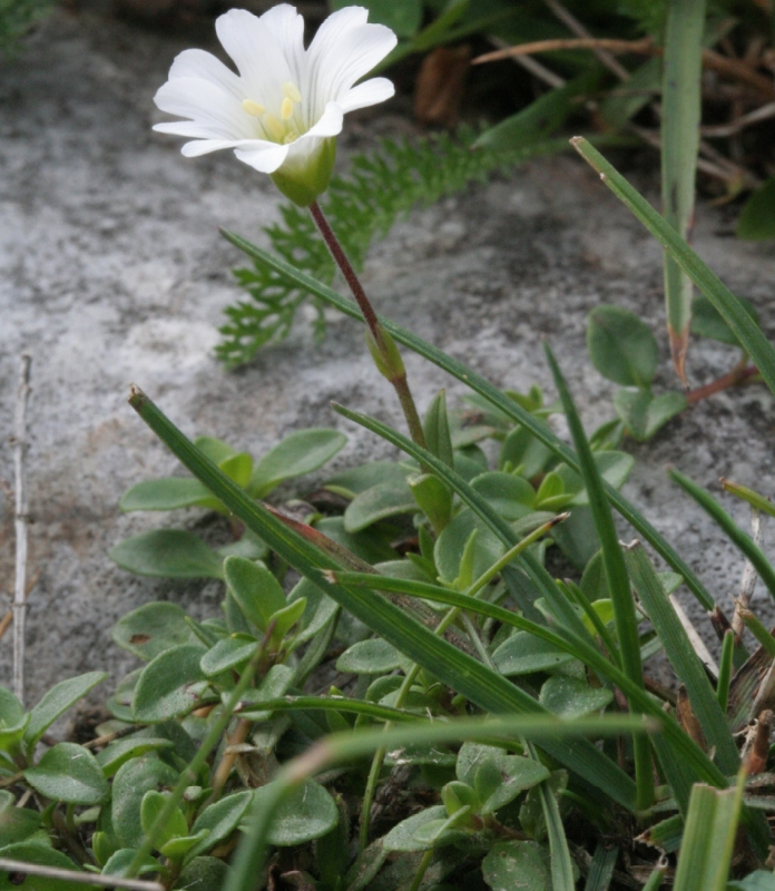 Cerastium alpinum (Peverina alpina)